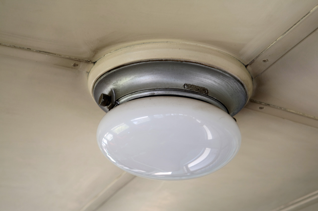 Kishu Railway Kiha 600